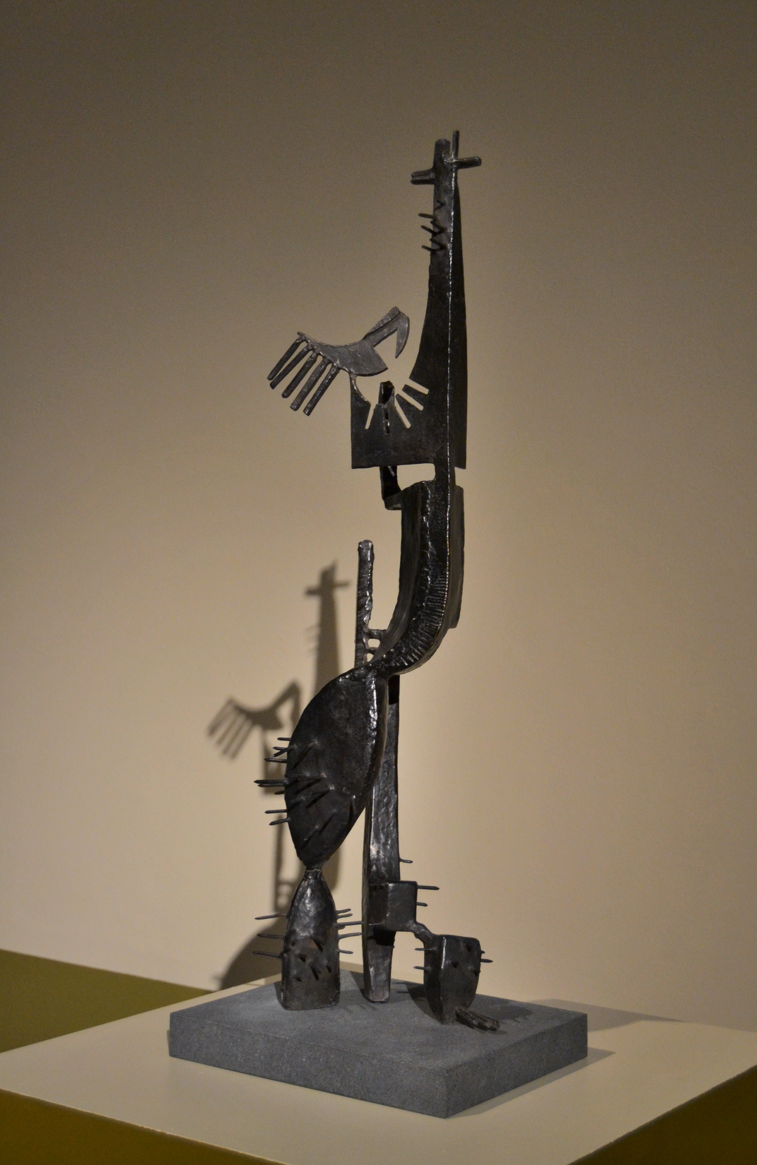 Senyora Cactus (L'home Cactus II), [Madame Cactus (Homme Cactus II)], Julio González. Ca. 1939 - 1940. Bronze fos, 79,3 x 25,6 x 19,2 cm. Institut Valencià d'Art Modern.